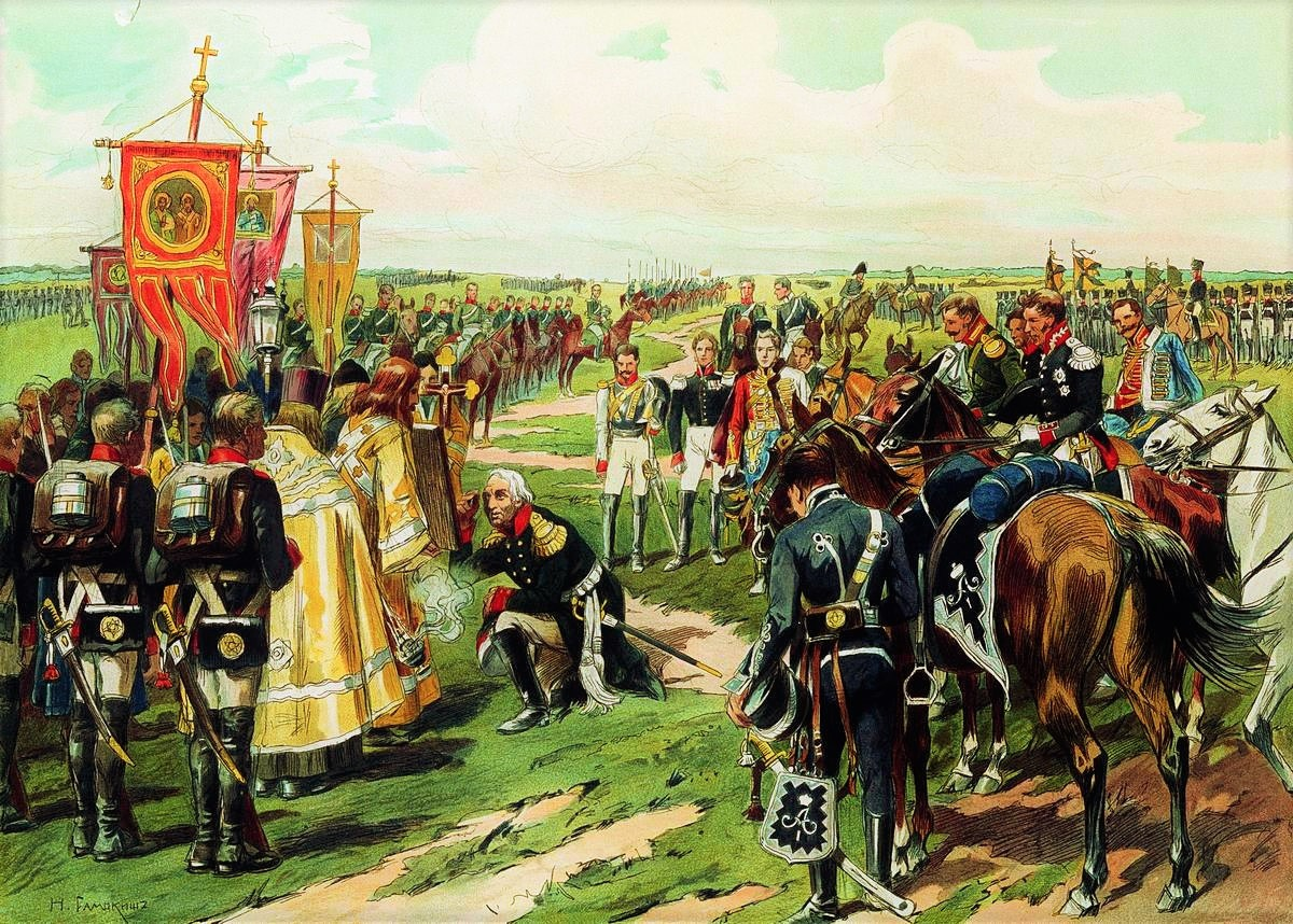 Николай Самокиш. Кутузов перед битвой при Бородино (Объезд войск 25 августа 1812 года). Цветная литография по оригинальному рисунку. Музей-панорама «Бородинская битва» Под изображением имеется печатный текст: «День 25 августа - канун Бородинского боя - прошёл в приготовлениях к предстоящему сражению. Все готовились к смерти, понимая, что должно или умереть, или спасти Отечество. Зная твердую и горячую веру русского солдата в помощь Божию, главнокомандующий приказал пронести по рядам чудотворный образ Смоленской Божией Матери».